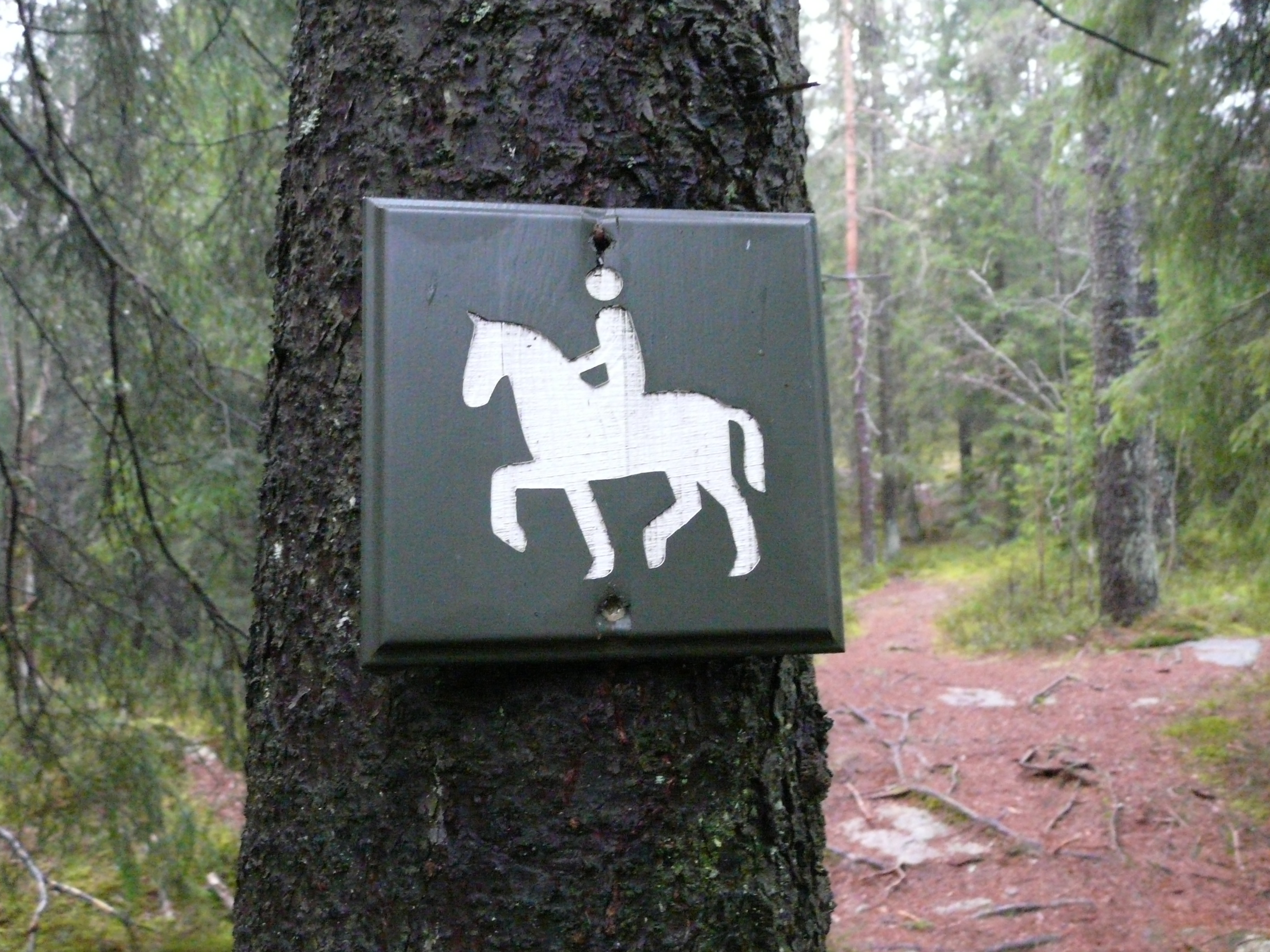 Skilting om ridesti. Lillomarka, Oslo.